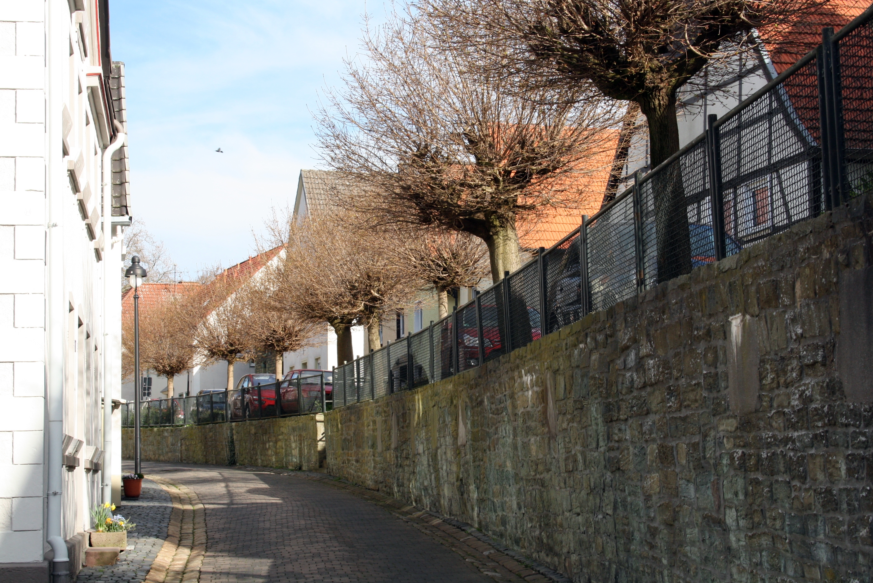 Reste der denkmalgeschützten alten Stadtmauer, Kisastraße Neuergraben This image shows a heritage building in Germany, located in the North Rhine-Westphalian city Werl (no. A 155).